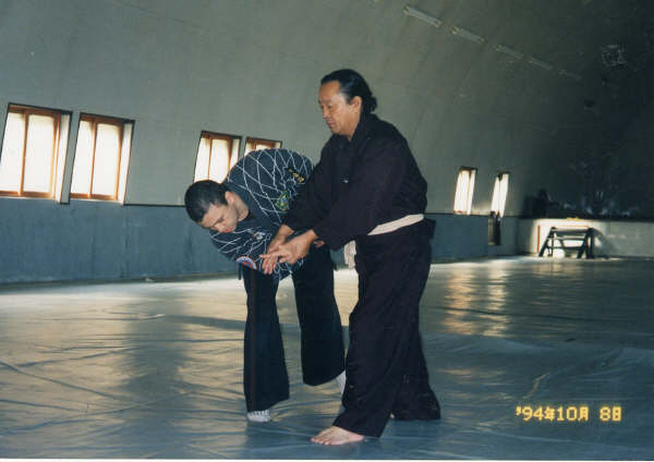 Kuksanim em ação com mestre sérgio